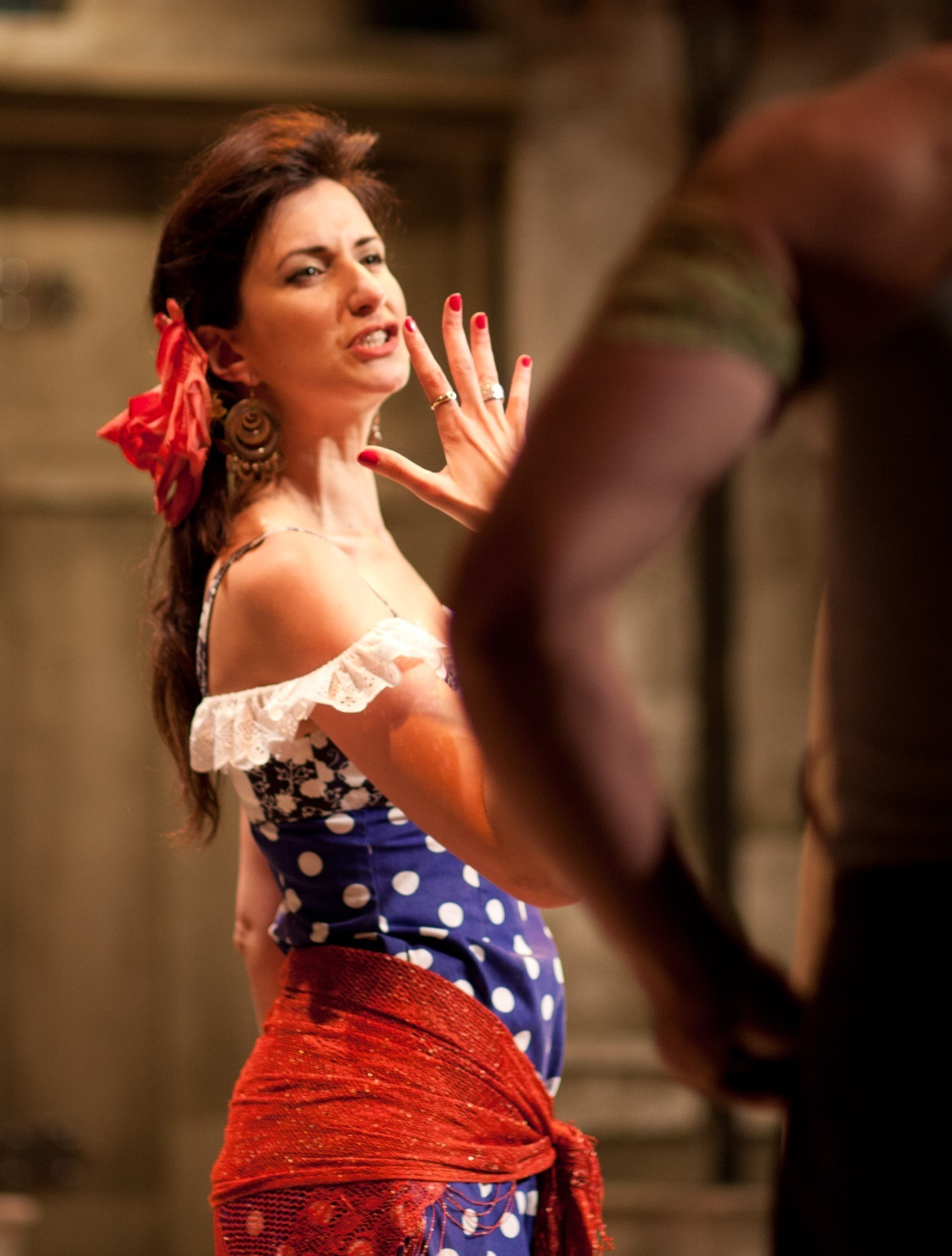 נילי צרויה בתפקיד אדריאנה, מתוך קומדיה של טעויות ת. באר שבע